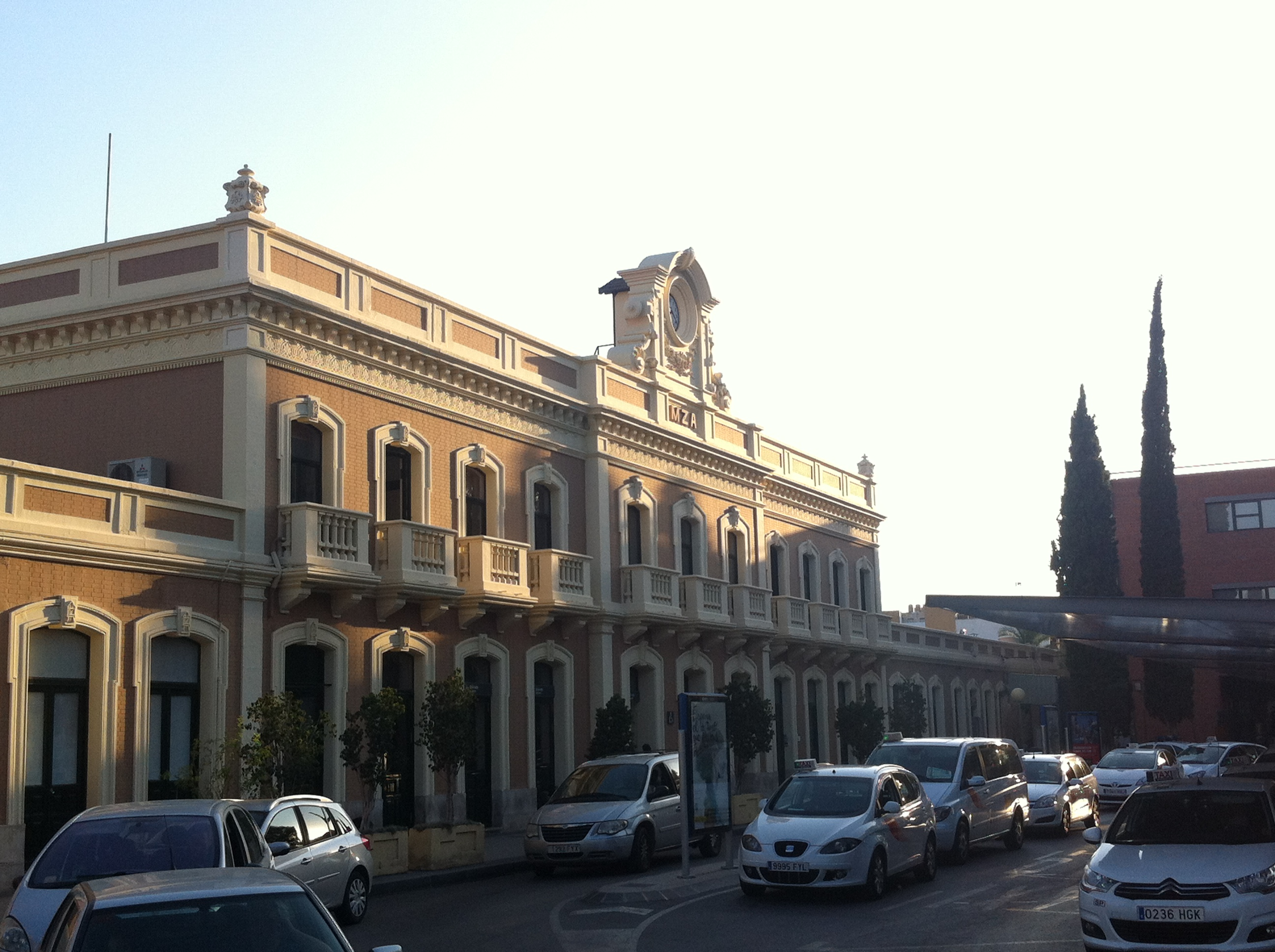 Imagen externa de la Estación de ferrocarril Murcia del Carmen (1862).